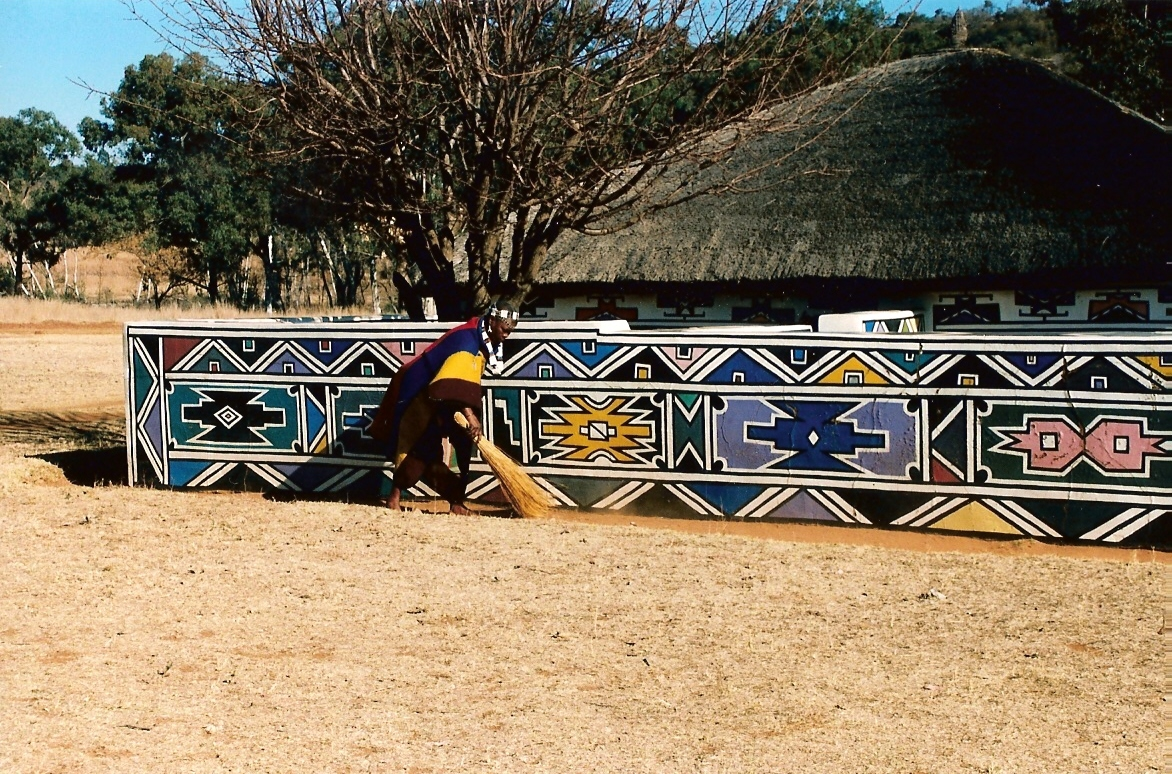 Botshabelo village